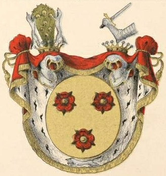 Roseni (punane) suguvõsa vabahärravapp